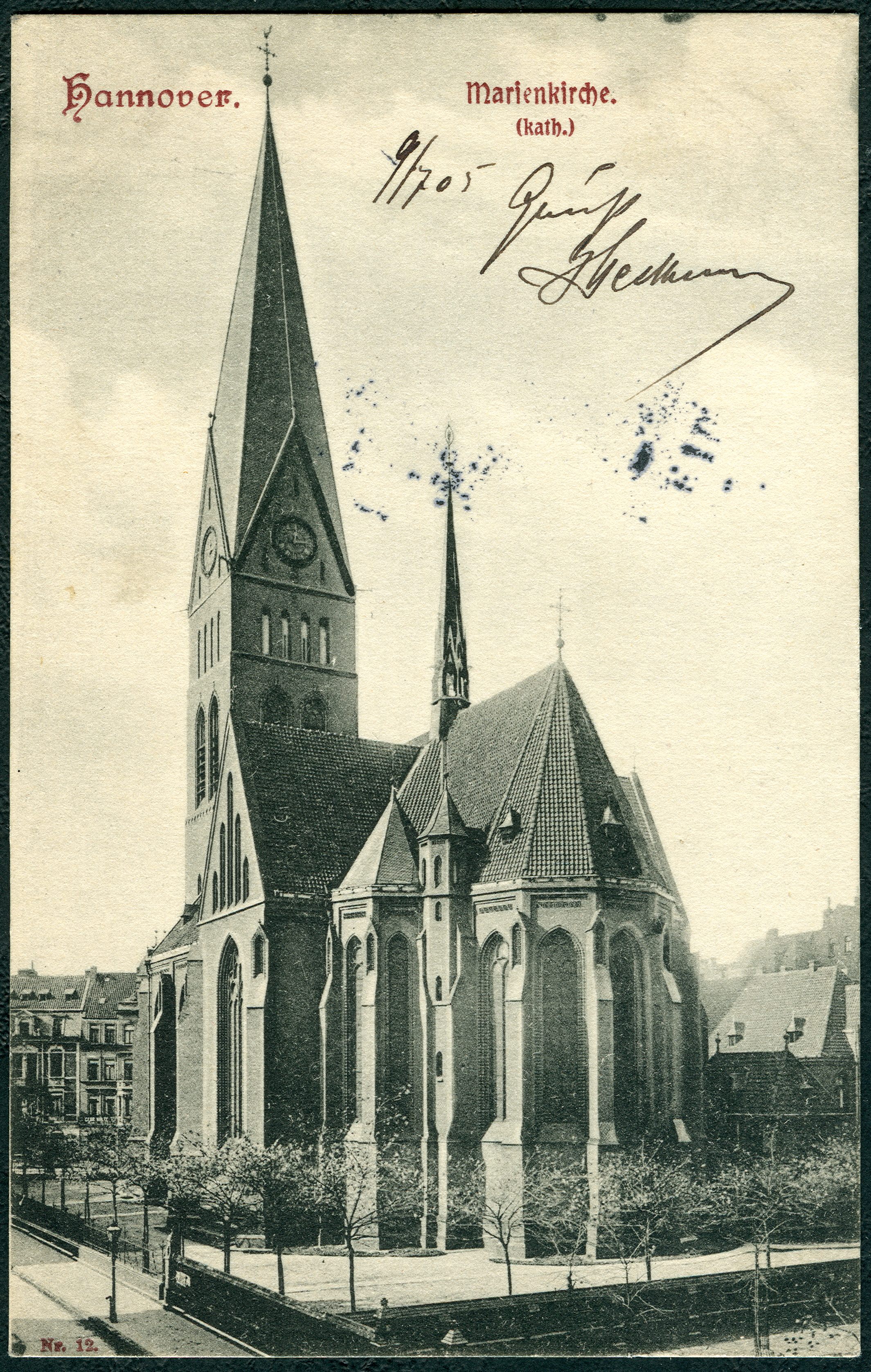 Ansicht um 1900 der Sankt Marienkirche in der Nordstadt von Hannover, gesehen vom (heute so genannten) Weidendamm ...